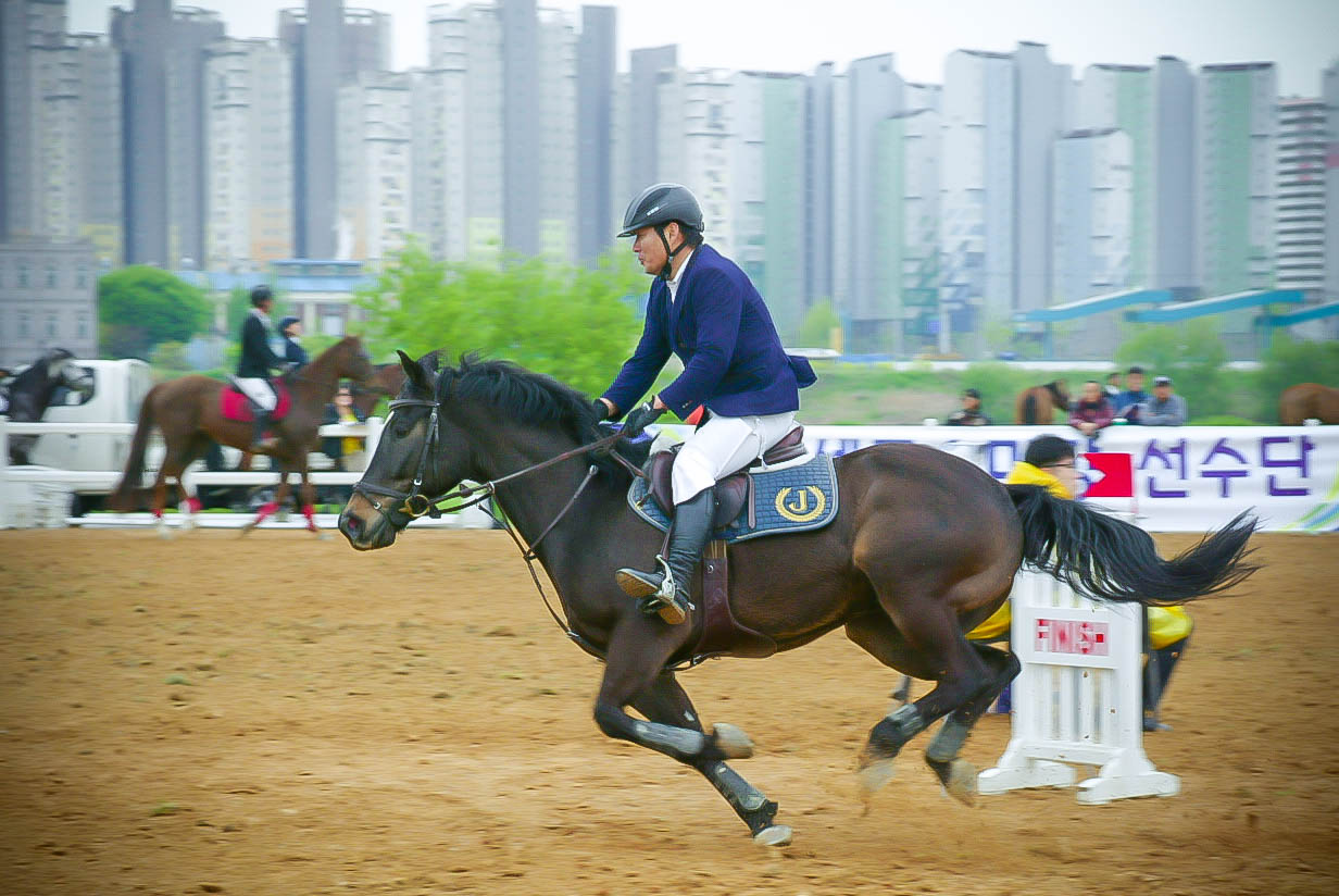 한 선수가 승마대회에서 장애물을 넘기 위해 전력 질주를 하고 있다.